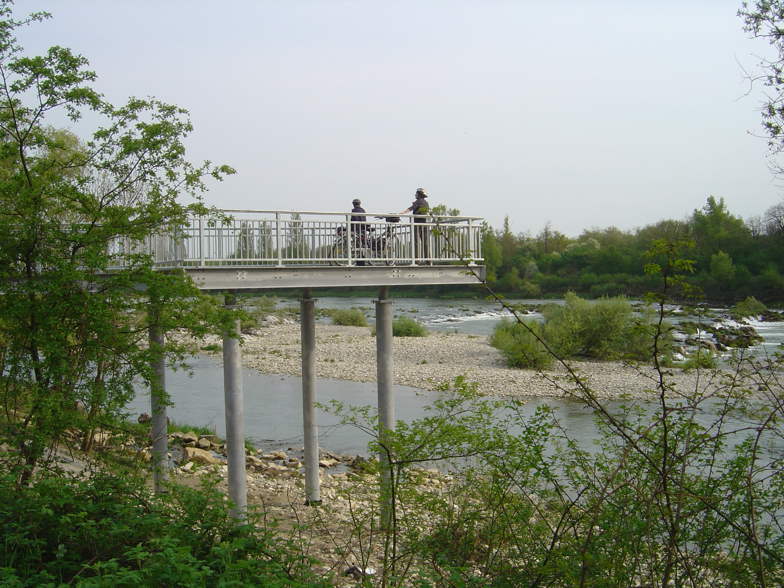 Besucherplattform Isteiner Schwellen